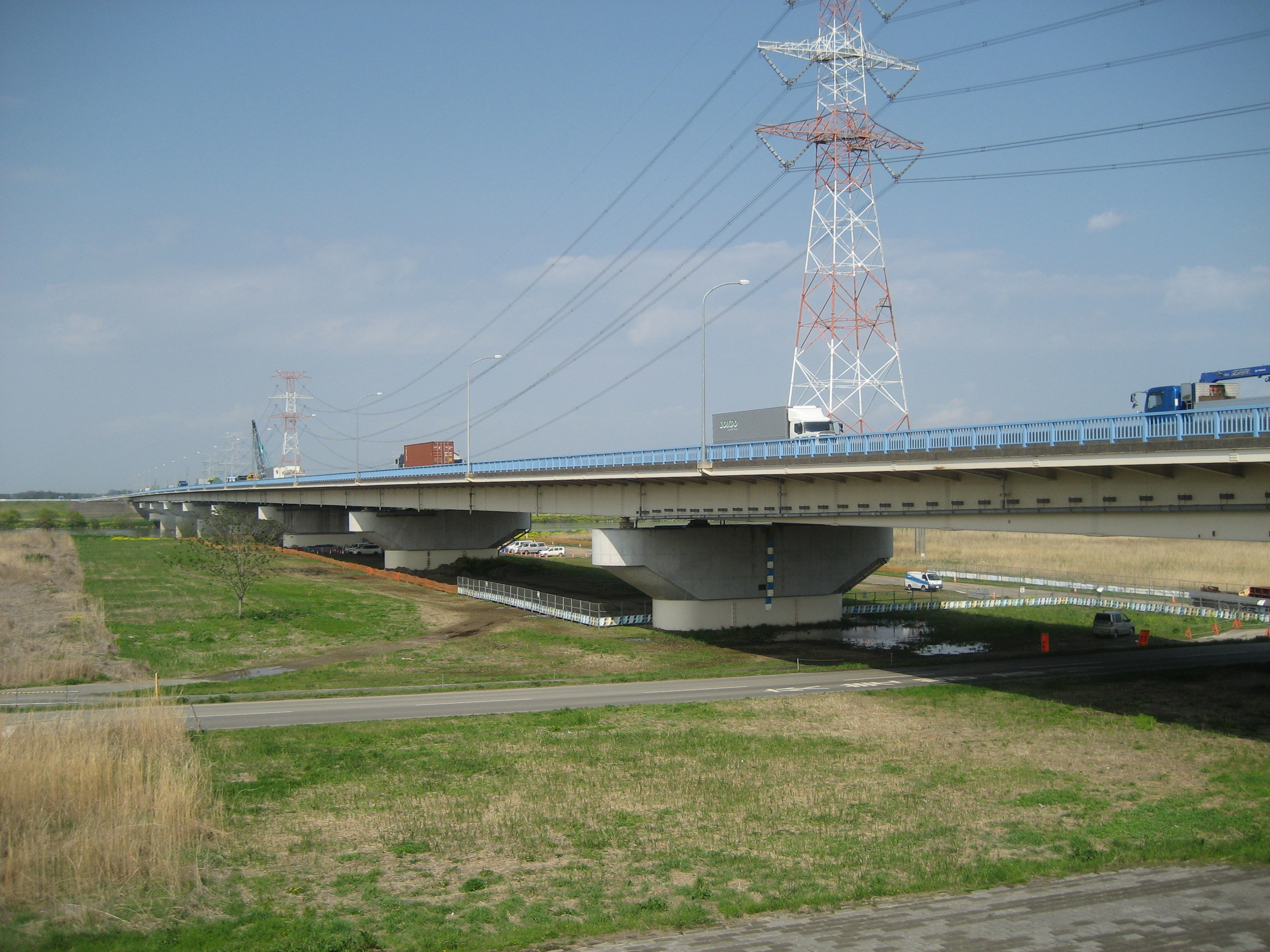 国道4号線（春日部古河バイパス）新利根川橋（五霞町側から撮影）